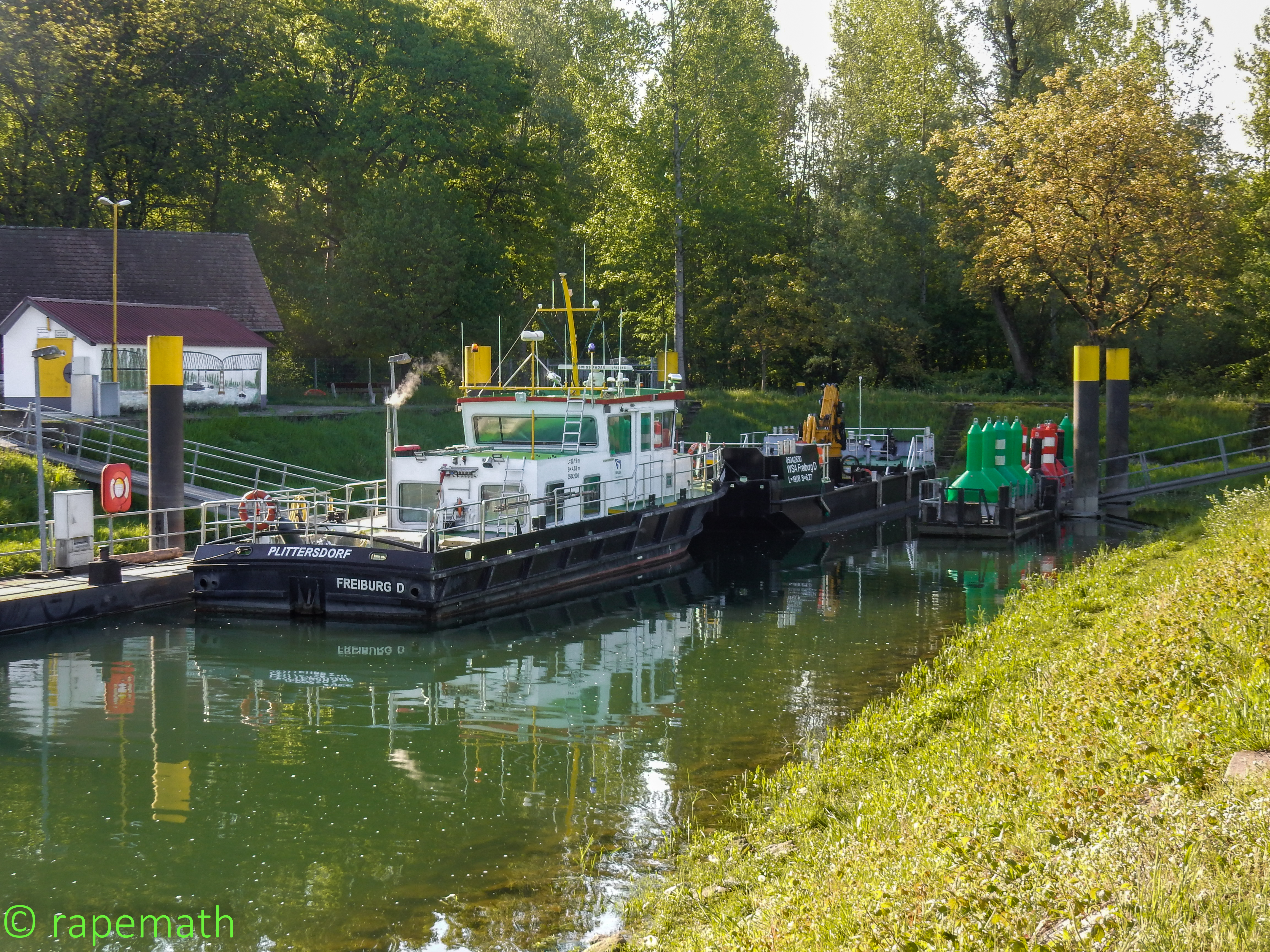 Das Arbeitsschiff Plittersdorf des WSA Freiburg an der Liegestelle in Plittersdorf